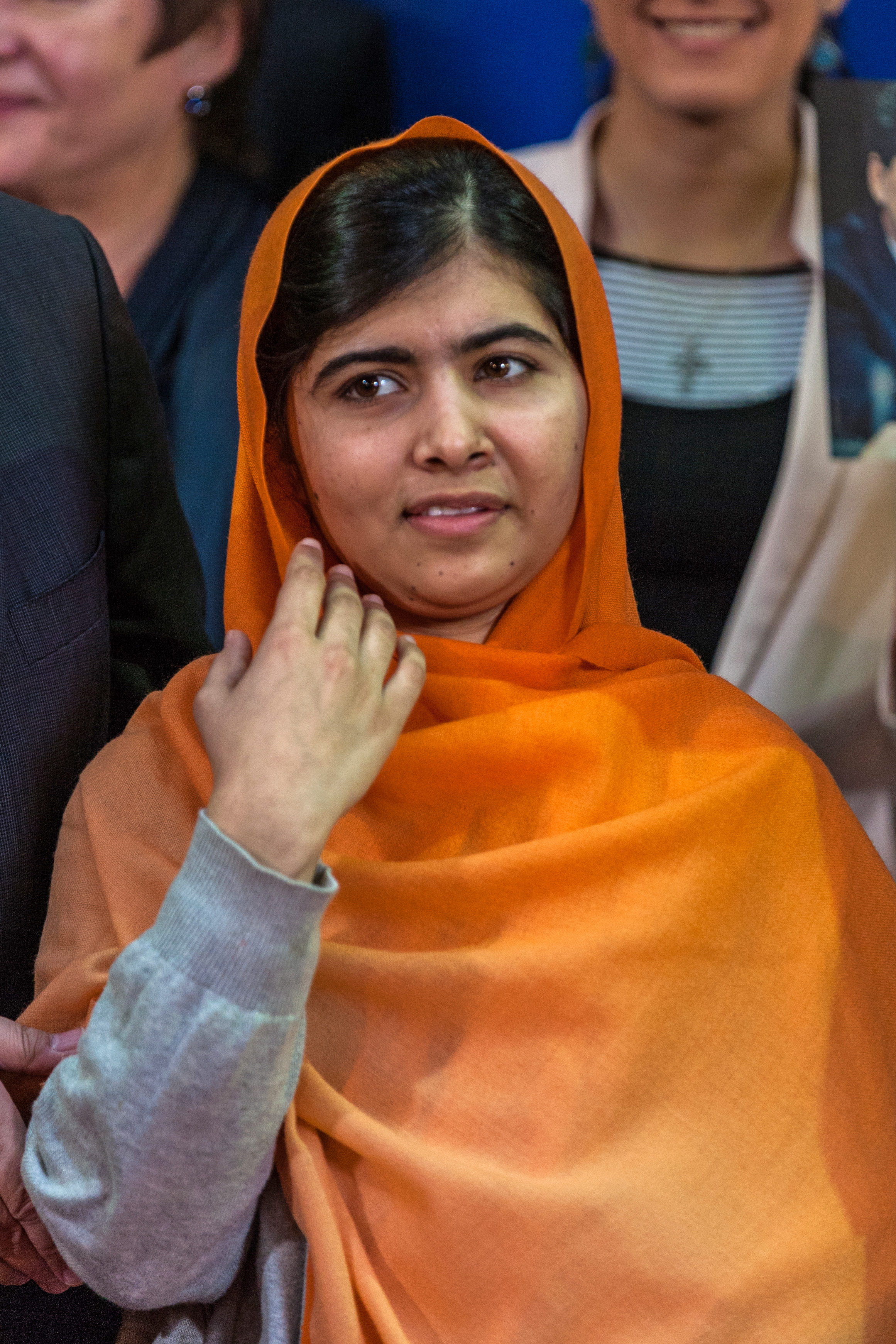 Photo de famille lors de la remise du 25e prix Sakharov à à Malala Yousafzai Strasbourg 20 novembre 2013